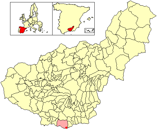 Situación de la localidad de La Perla (en el municipio de Motril) respecto a la provincia de Granada, en España.